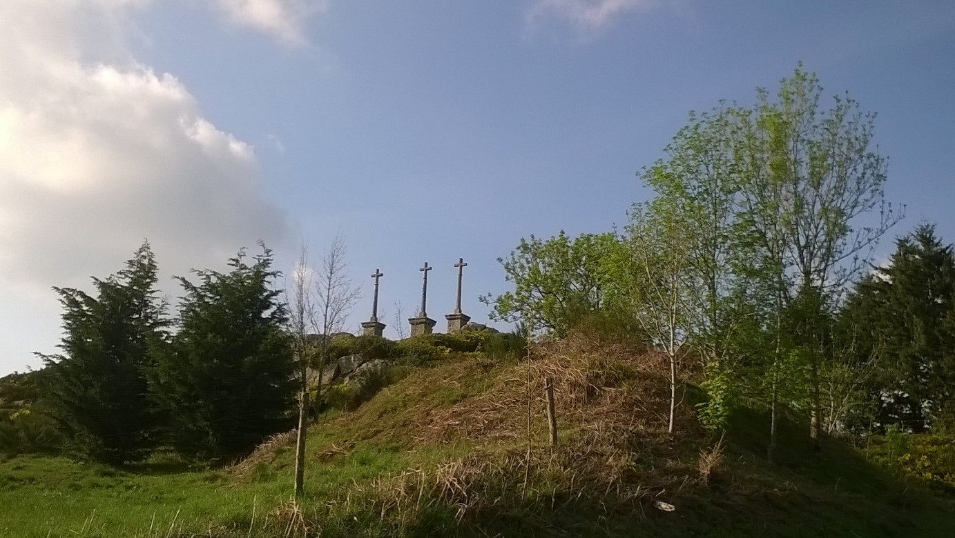 montregard4